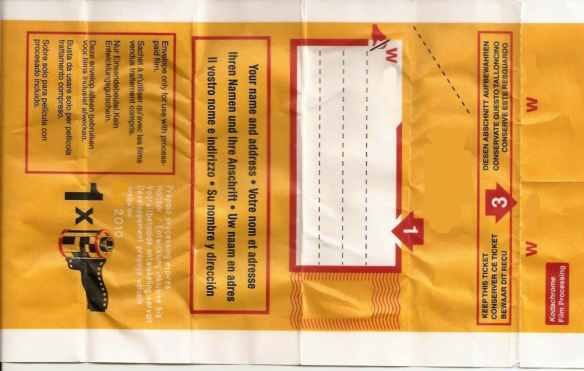 Pochette d'envoi Kodachrome (Verso)